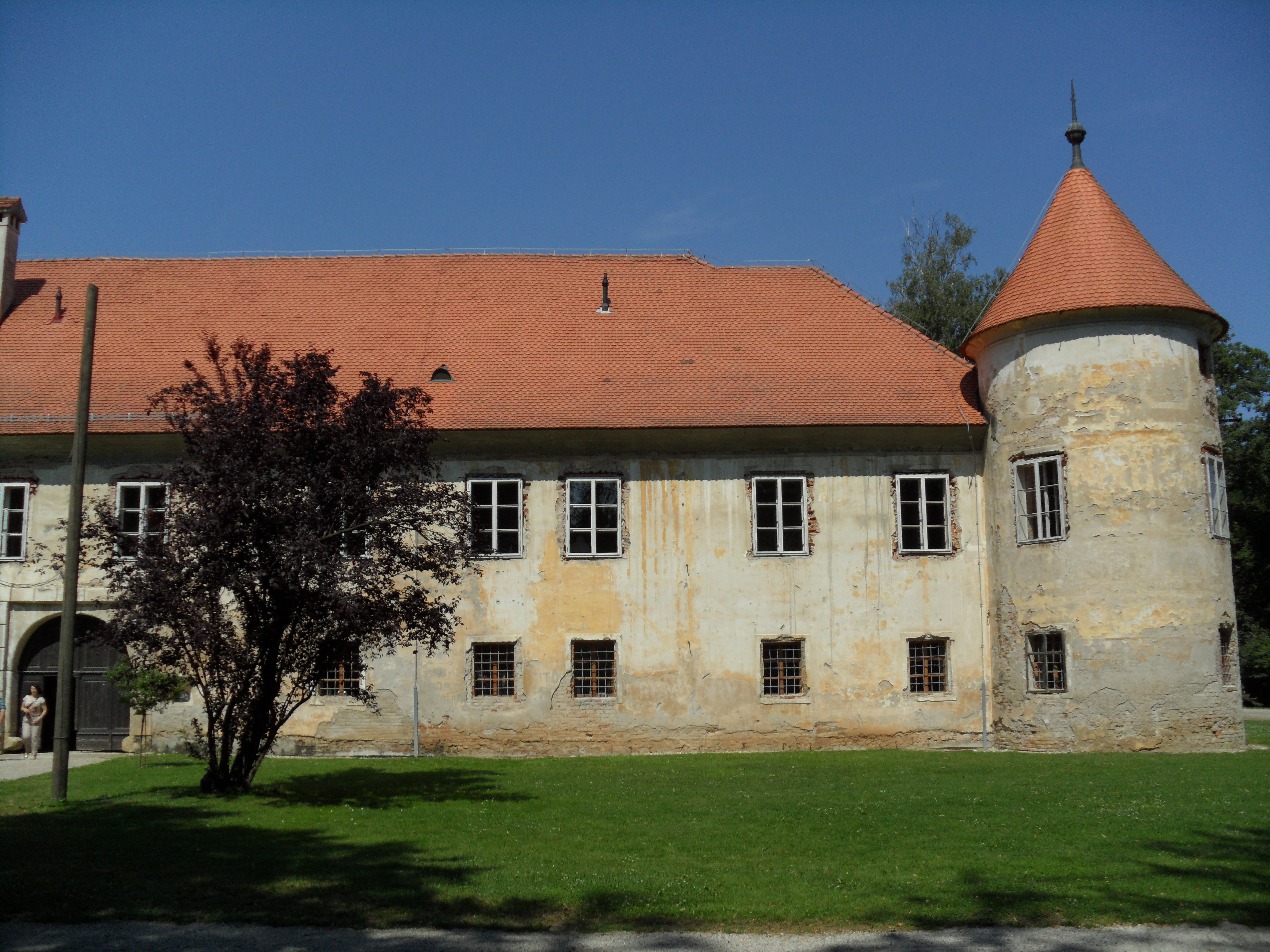 Baročni grad Beltinci